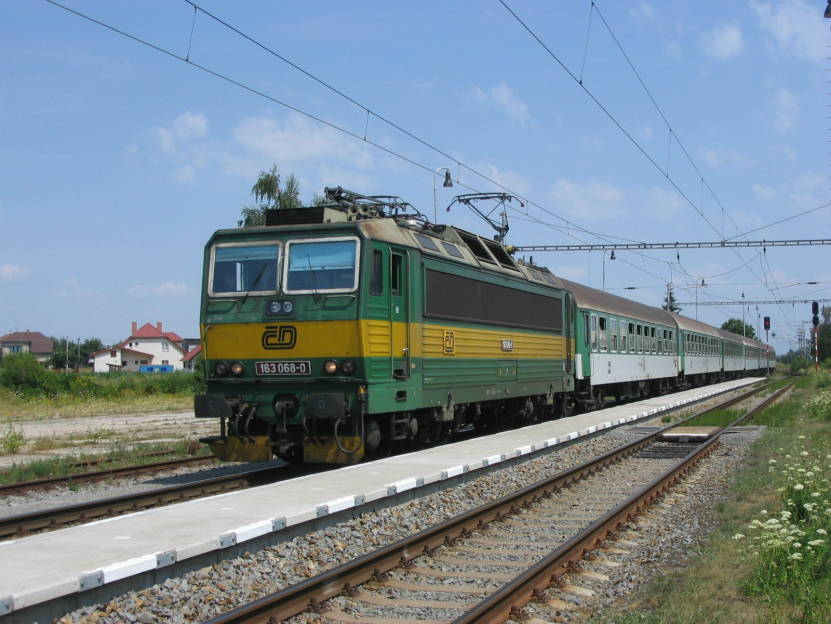 Lokomotiva řady 163, stanice Praskačka